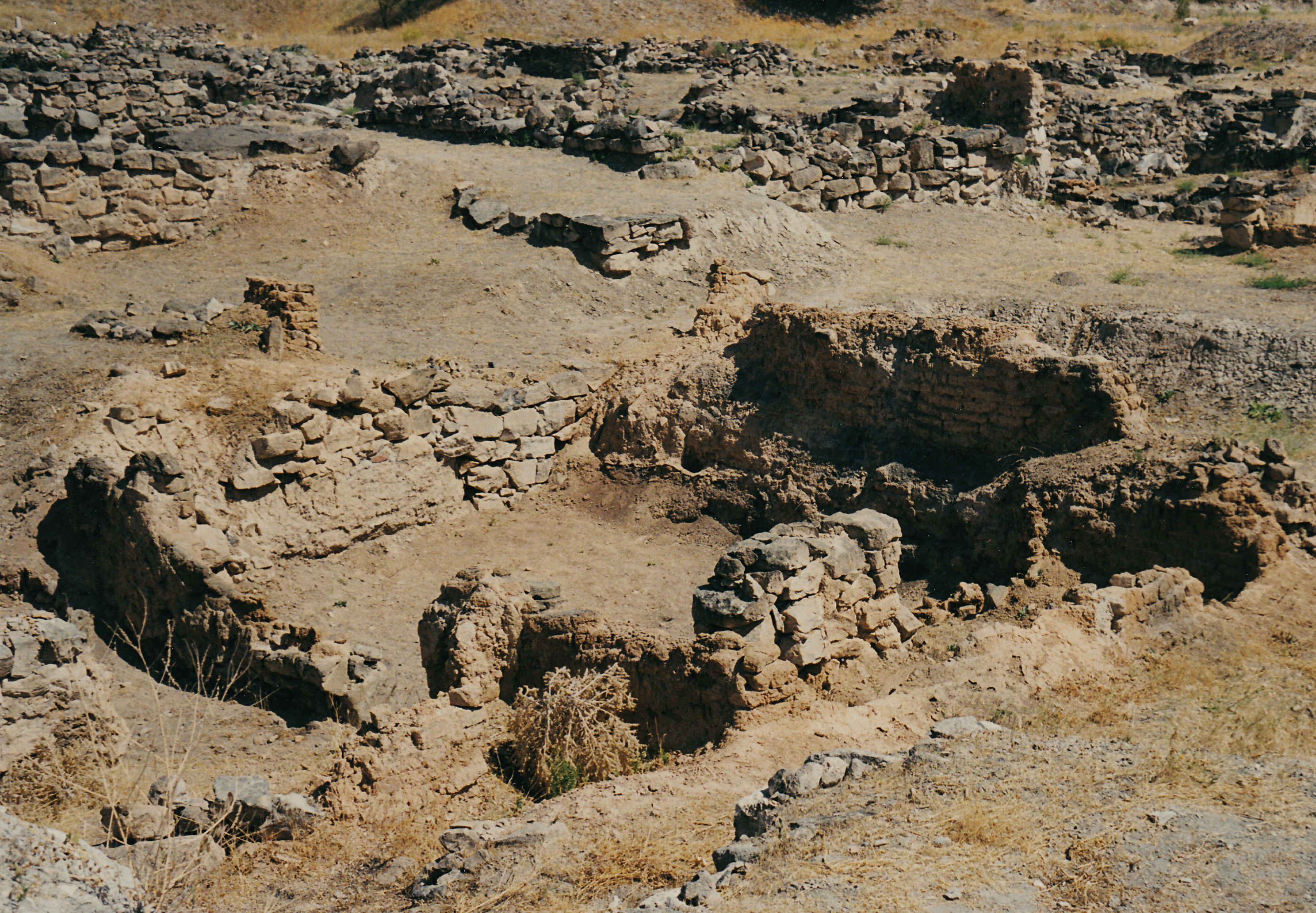 Kültepe-Kanes, bronzezeitlicher Fundort in der Zentraltürkei, Unterstadt-Karum